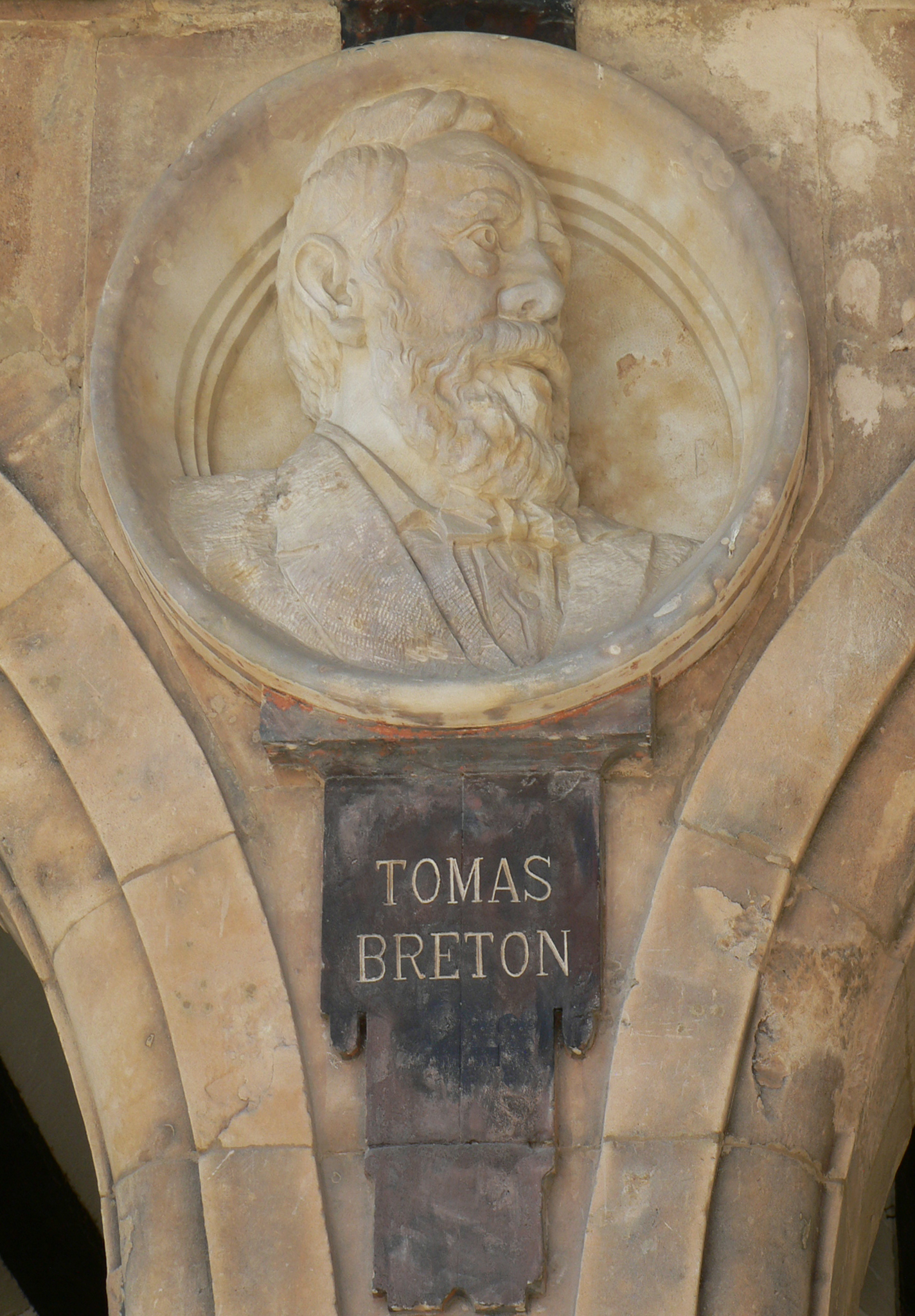 Medallón con la efigie de Tomás Bretón, en el Pabellón de Petrineros, Plaza Mayor de Salamanca (España).